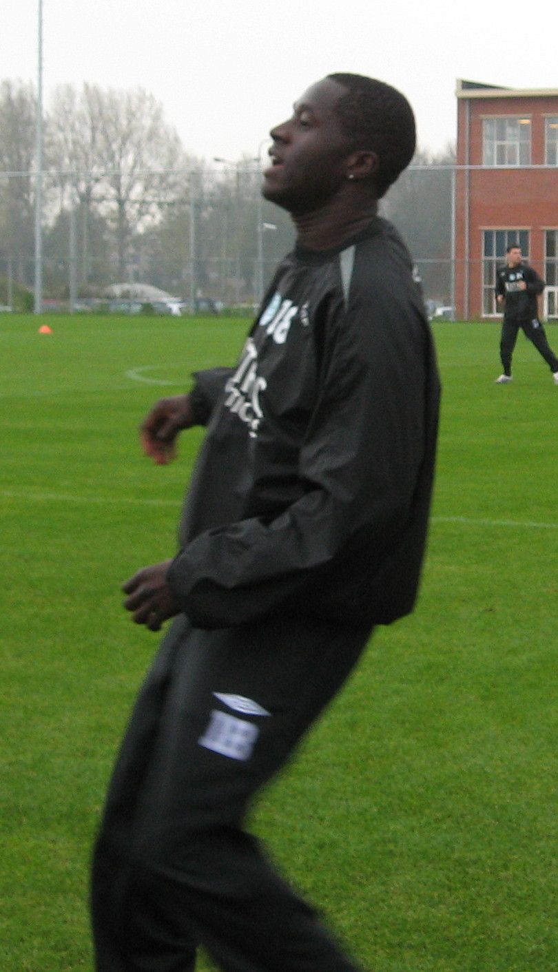 FC Groningen-speler Gibril Sankoh